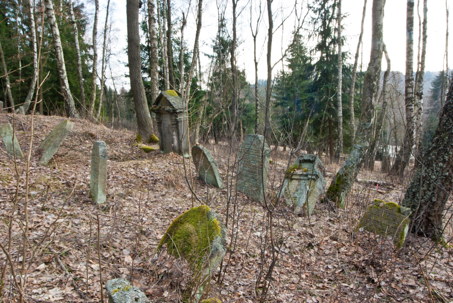 židovský hřbitov Krásná Lípa; více